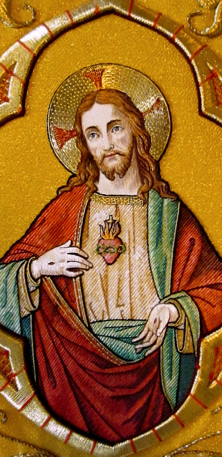 Goudborduurwerk H. van Severen, Sint-Niklaas Ca.1900